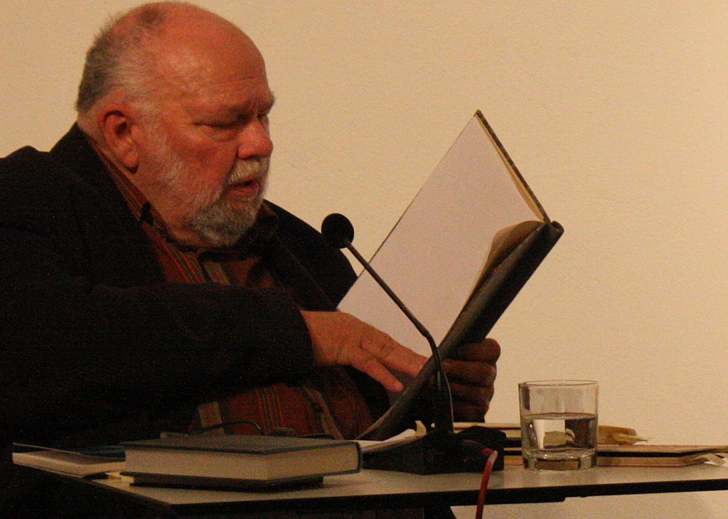 Hornjoserbsce: Hornjoserbski basnik Kito Lorenc na čitanju w Berlinje dnja 18. septembra 2013.